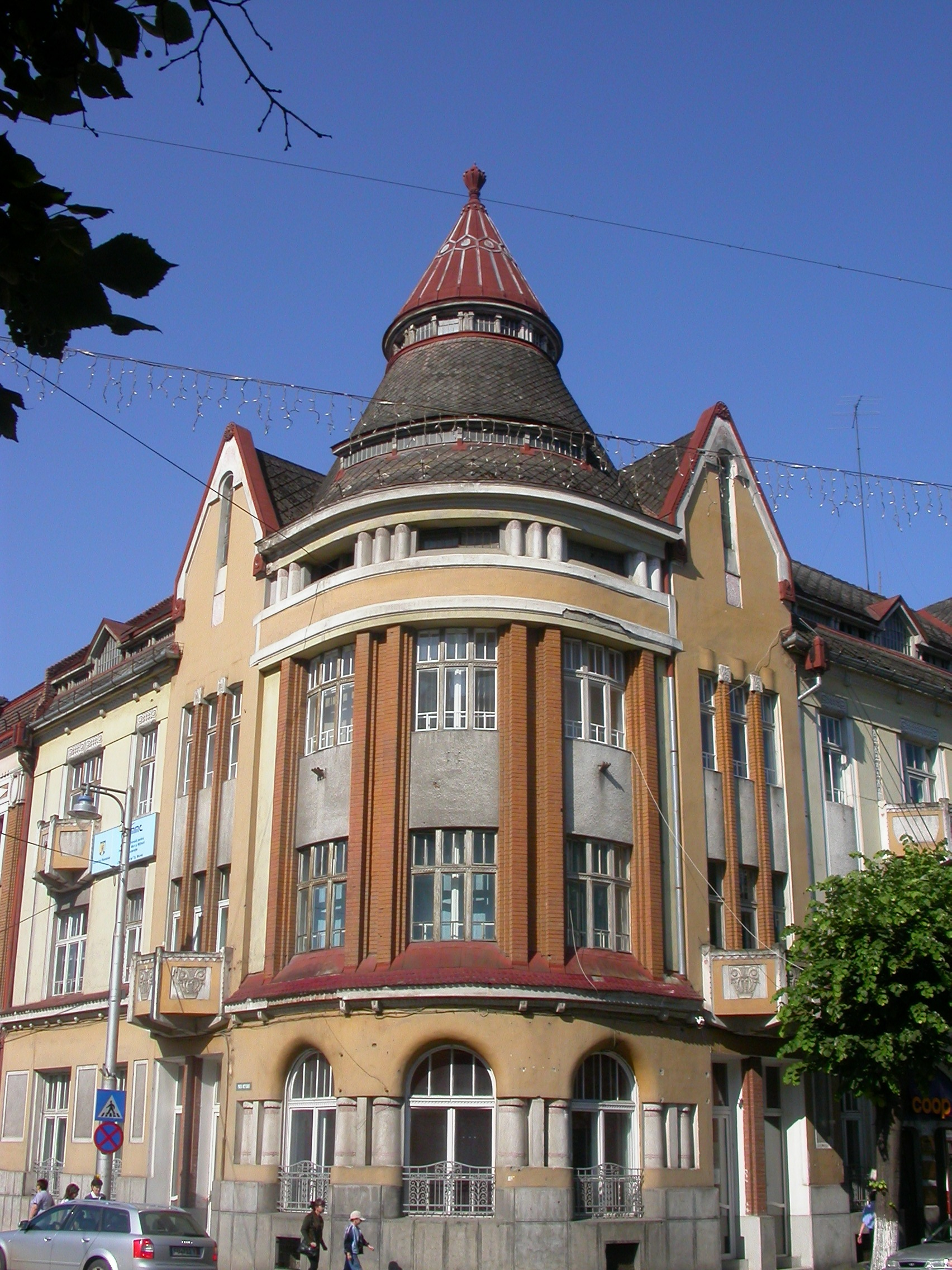 Fosta bancă "Albina", azi Federalcoop, birouri, 1910